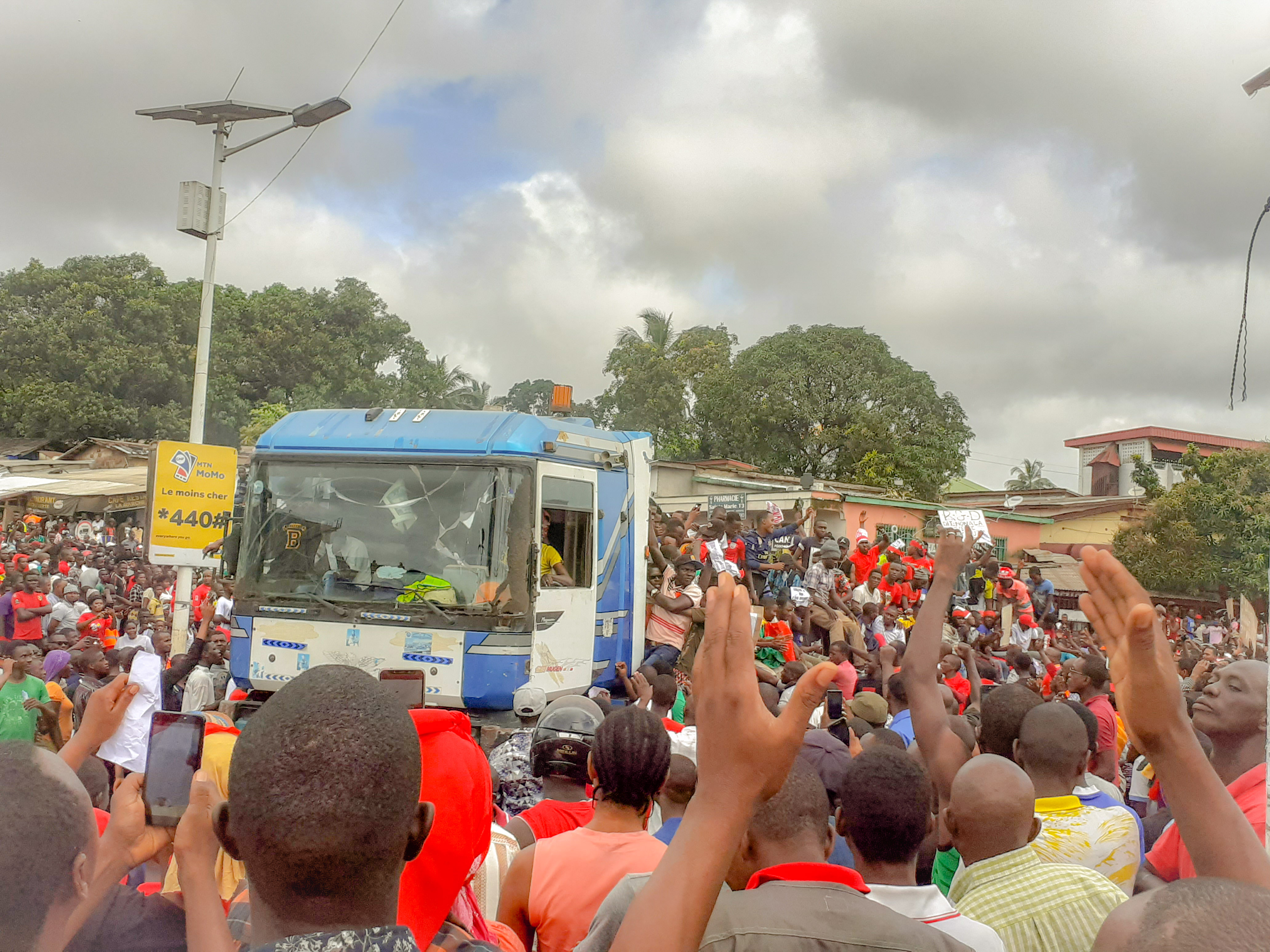 Camion transportant des manifestant à Conakry This is an image with the theme "Africa on the Move or Transport" from: Guinea